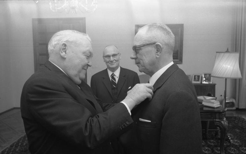 Ordensüberreichung an St. Hüttebräuker vom BML (durch Bundeskanzler Erhard)